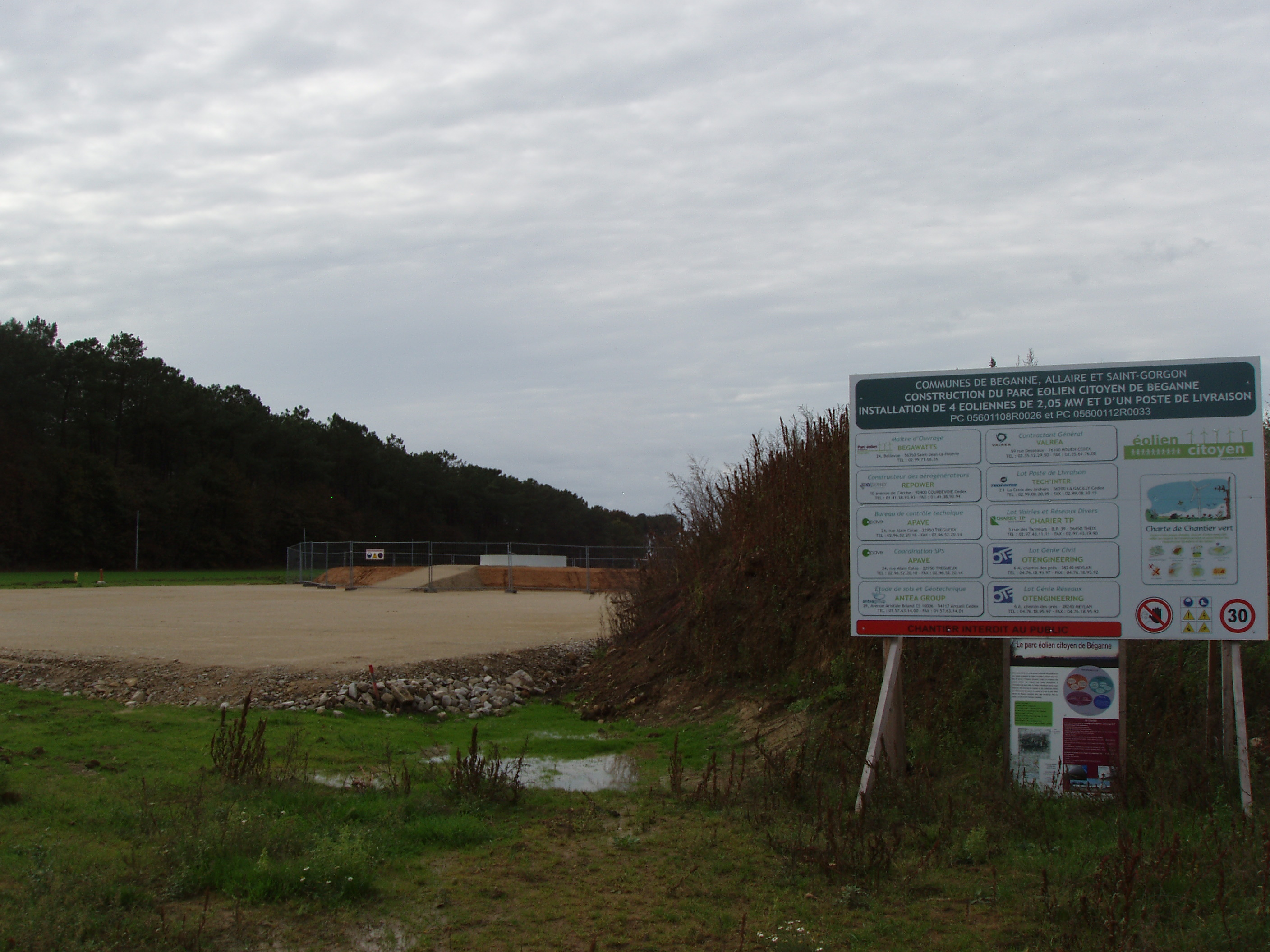 Photo du chantier du premier parc éolien citoyen sur la commune de Béganne